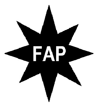 Escudo usado por las FAP en sus comunicados